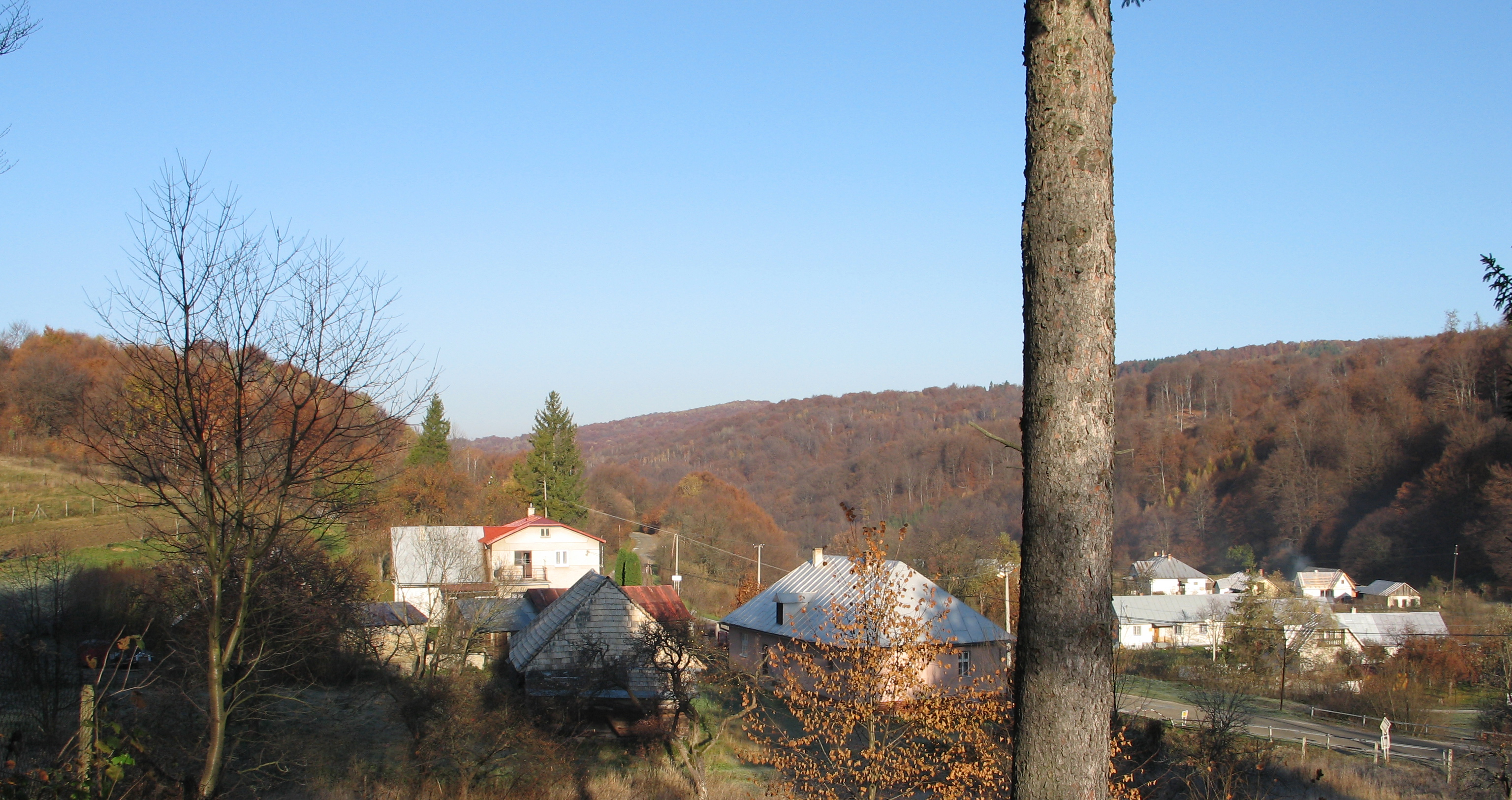 Bodružal jesenná panoráma s výhľadom na horizont vrchu Čerešňa, kde v čase 2. svetovej vojny bol Nemcami vybudovaný obranný systém zákopov.